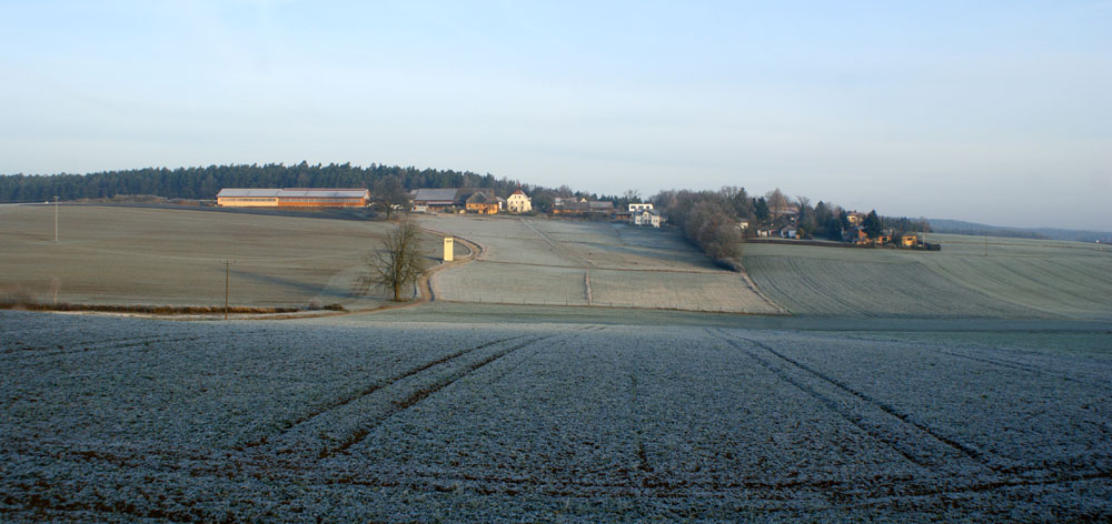 Grain, Ortsteil der ehemaligen Gemeine Neukirchen, jetzt Stadt Schwandorf